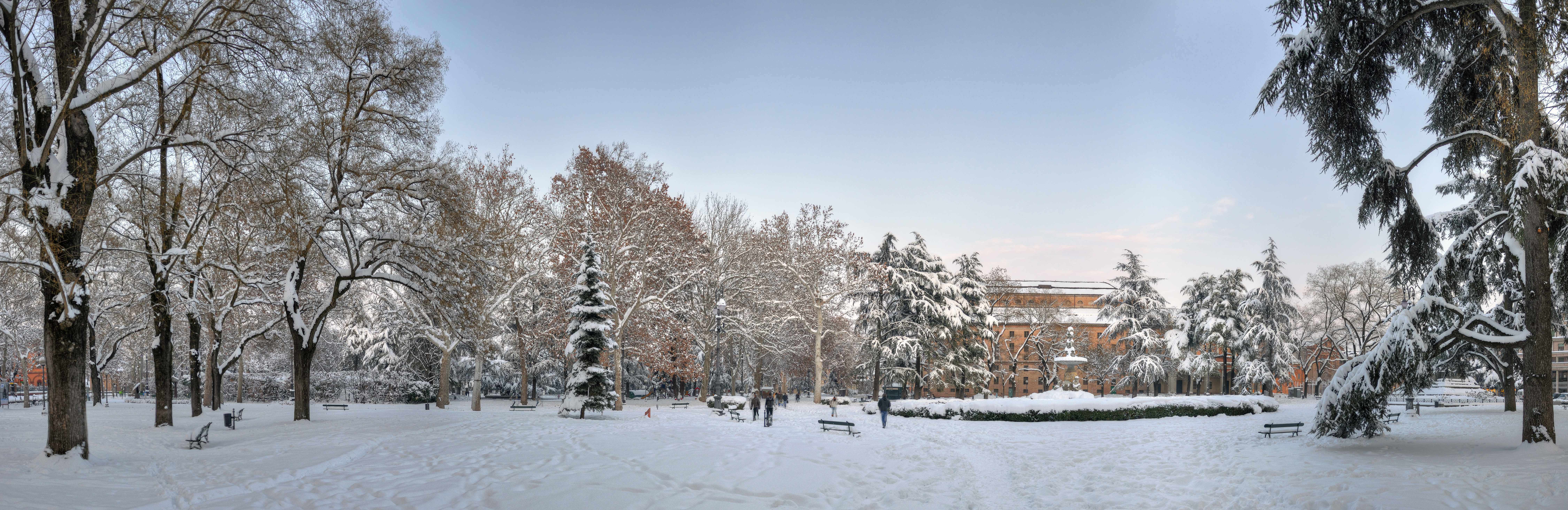 Parco del Popolo (Giardini Pubblici) - Reggio Emilia, Italia